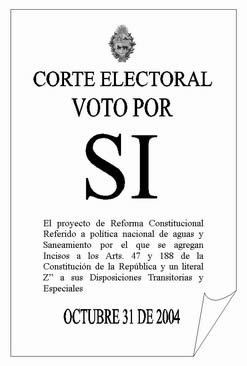 Bulletin de vote utilisé lors du référendum constitutionnel uruguayen de 2004